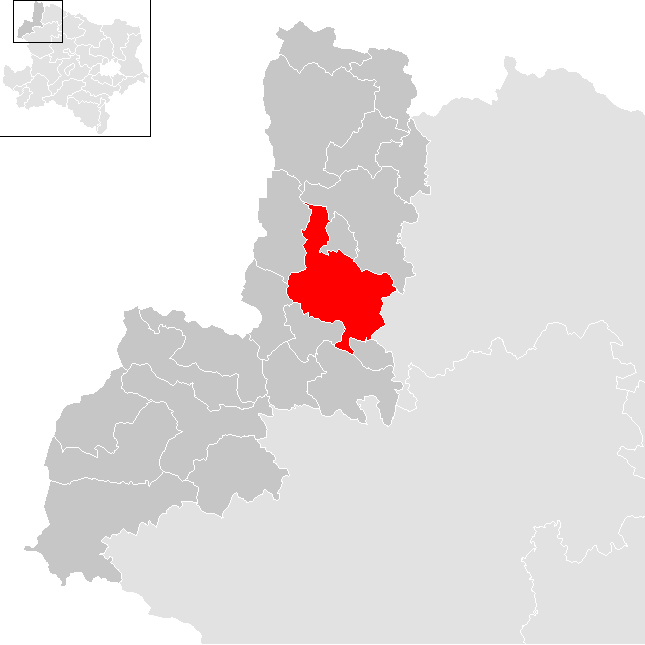 Bezirk Gmünd